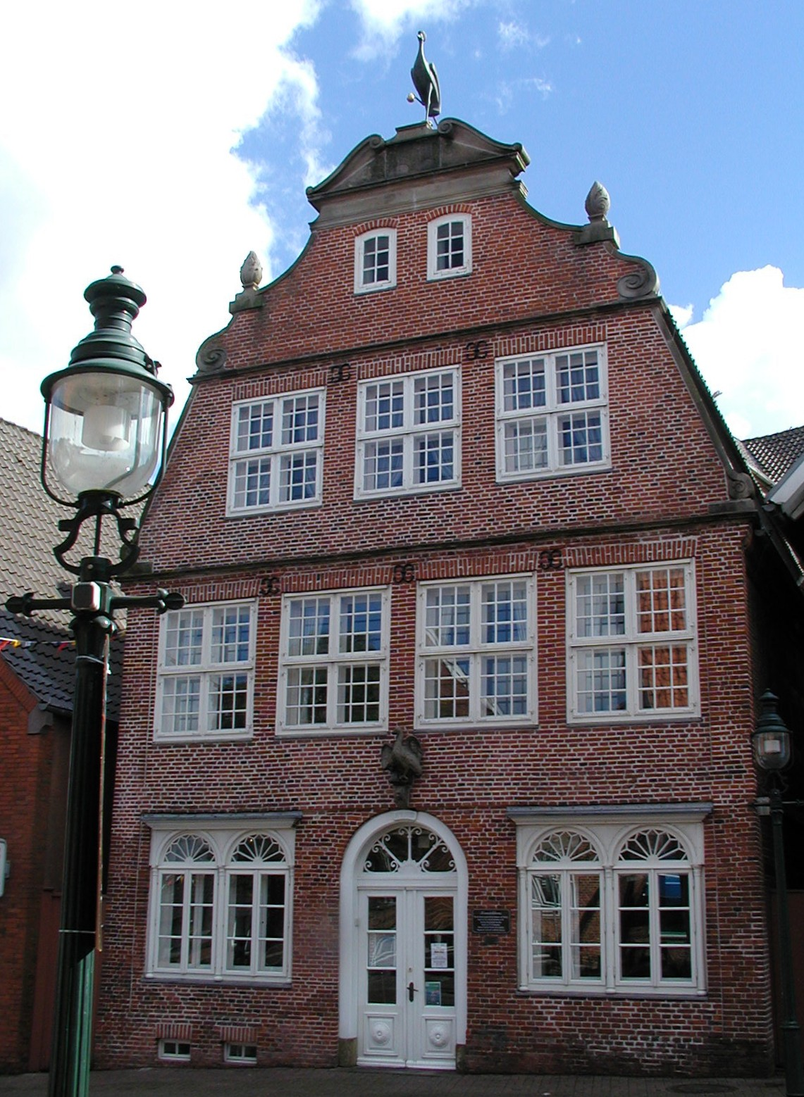 das Kranichhaus